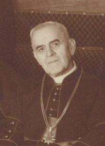 Probošt litoměřické kapituly sv. Štěpána Franz Xaver Reike při setkání kapituly v roce 1940